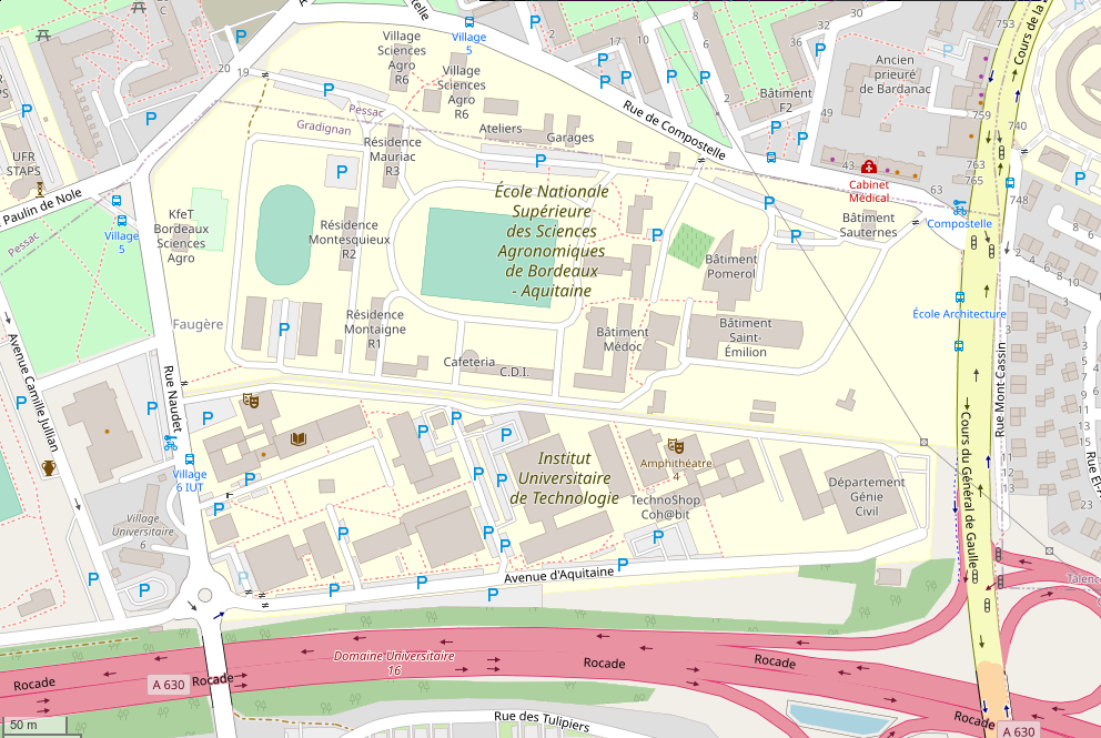 Bordeaux Sciences Agro